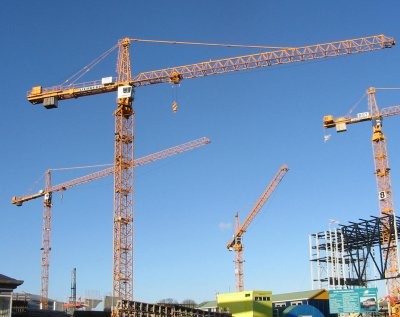 Hijskranen, bij bouw stadshart Alphen aan den Rijn, december 2003, eigen foto